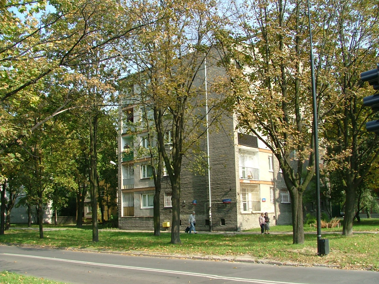 PL, Warsaw, Poland, Praga Południe, Grochów, ul. Garwolińska, Osiedle Młodych